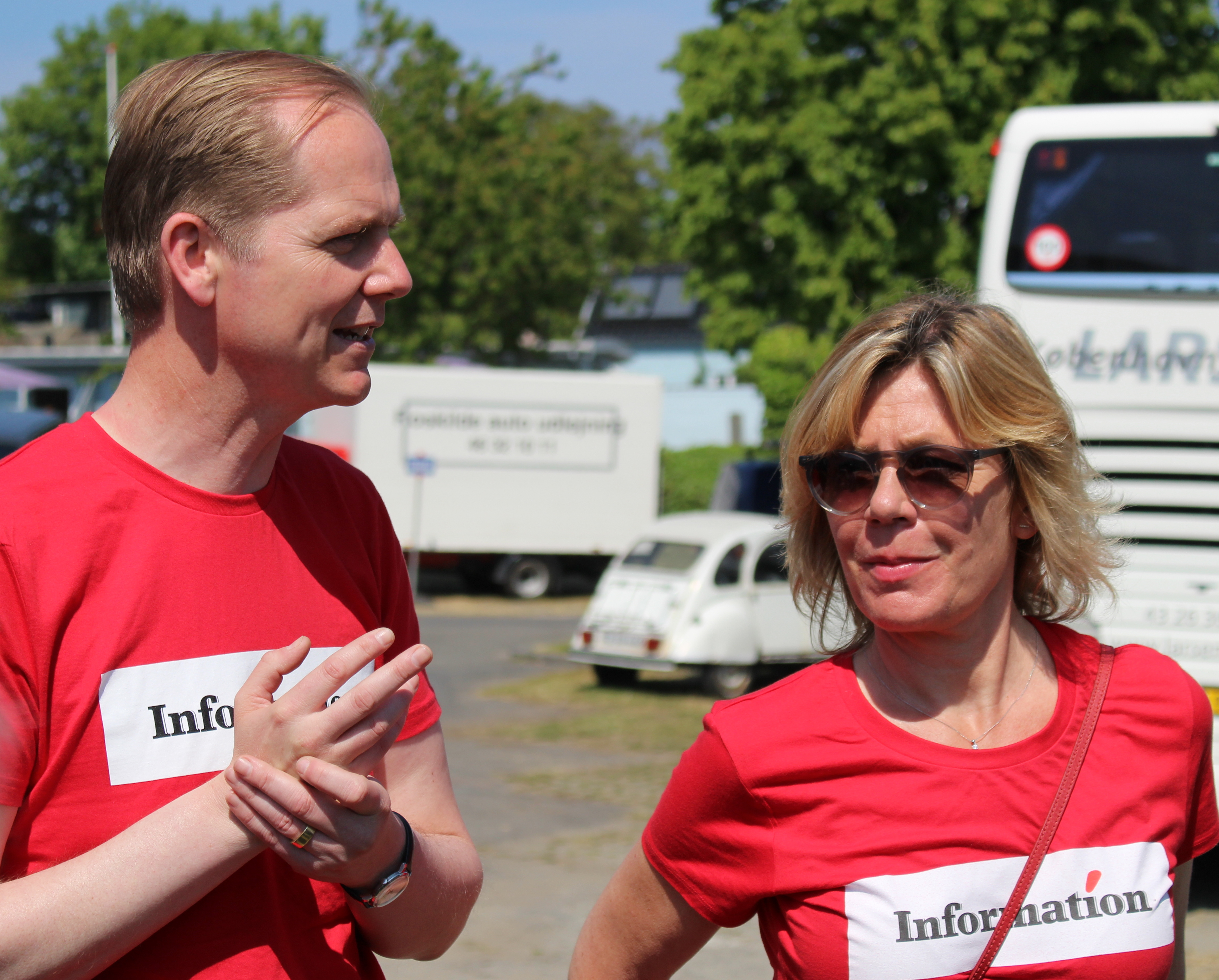 Christian Jensen og Mette Davidsen-Nielsen fra Dagbladet Information på parkeringspladsen ved Allinge under Folkemødet 2015